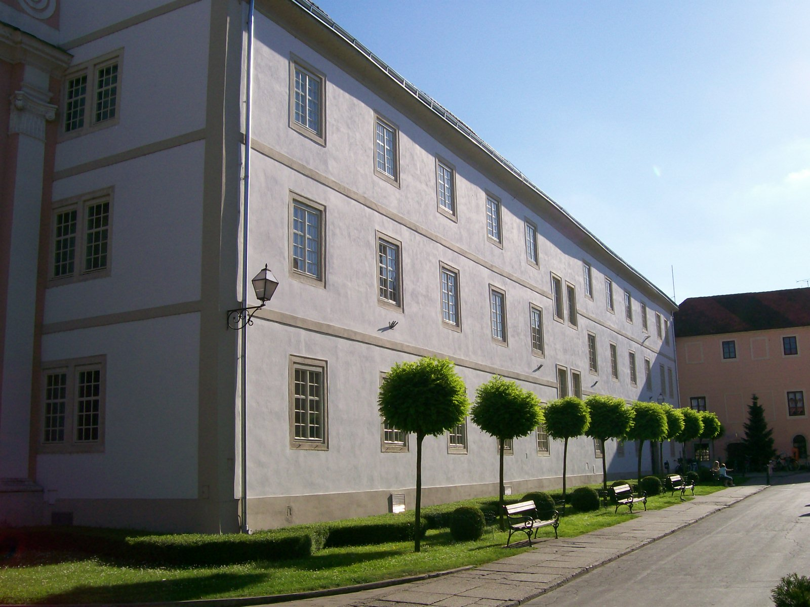 Fakultet organizacije i informatike u Varaždinu: zgrada Isusovačkog samostana